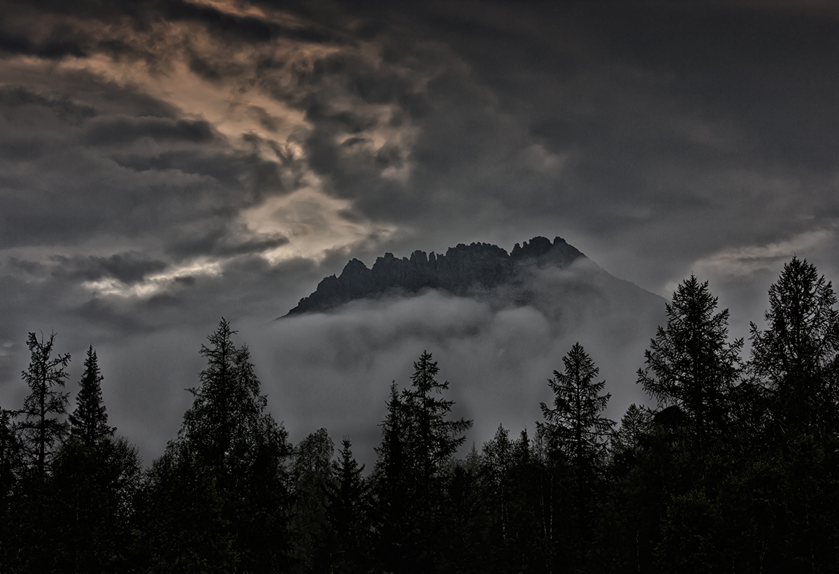 Югыд ва, национальный парк: Парк расположен на востоке Республики Коми, на территории Вуктыльского (47,6% общей площади), Печорского (22,4%) и Интинского (30%) административных районов. На юге парк граничит с Печоро-Илычским государственным природным заповедником, Вуктыл, Вуктыльский район, республика Коми This image is related to the protected area of Russia number 1100067